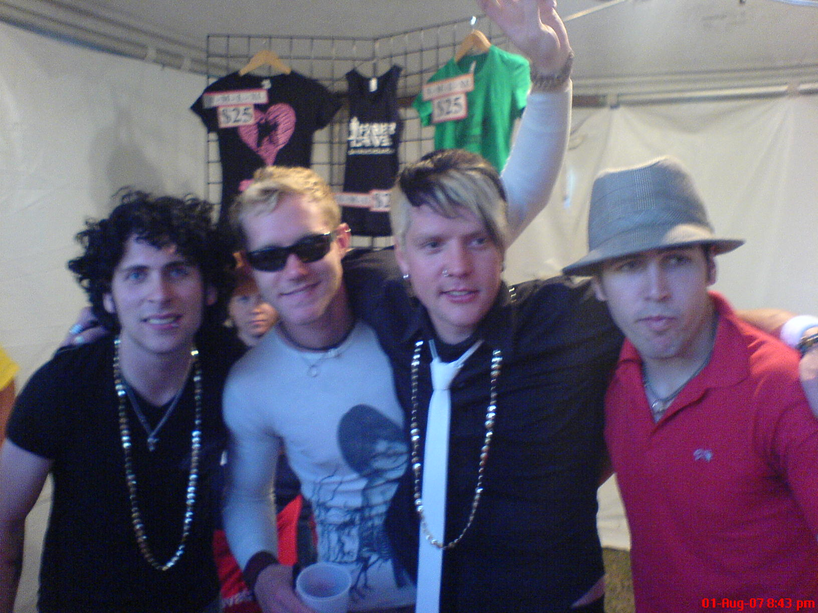 Faber Drive in Regina, Saskatchewan, Kanada